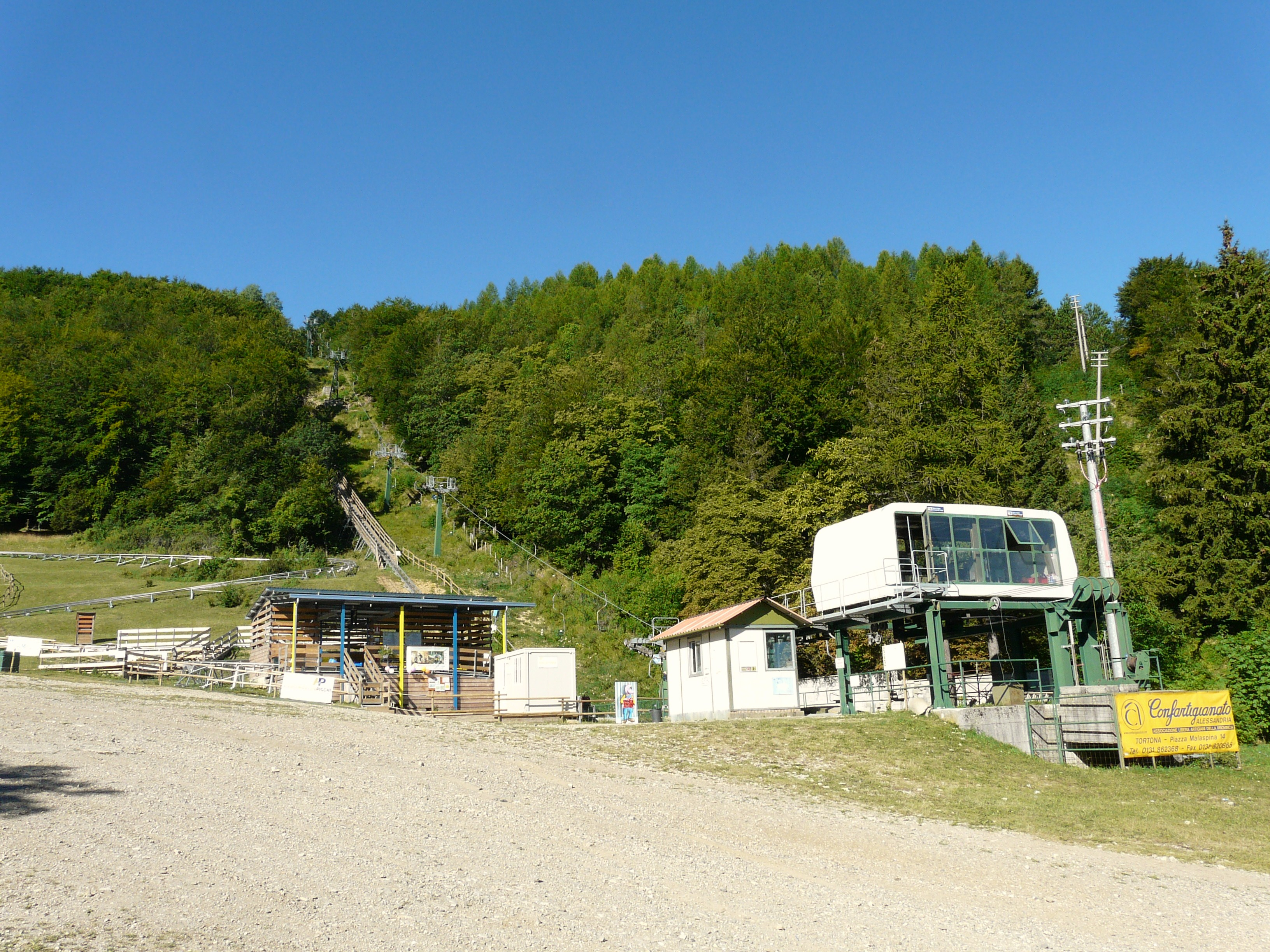 Stazione di partenza della seggiovia Caldirola-Monte Gropà, Caldirola, Comune di Fabbrica Curone, Piemonte, Italia